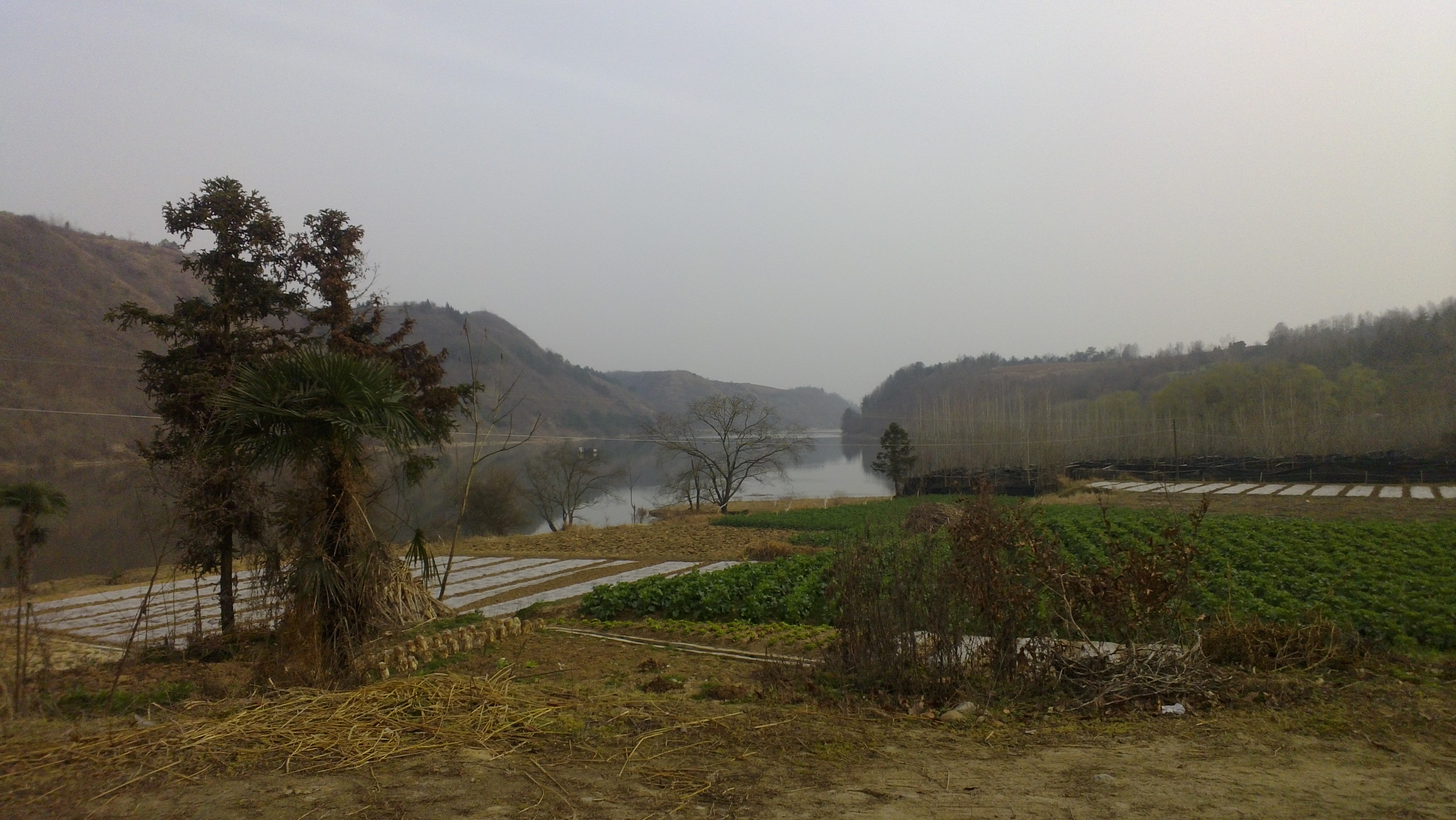 中文（台灣）: 沙河水庫，位於陝西省洋縣磨子橋鎮。（2015年3月3日拍攝）